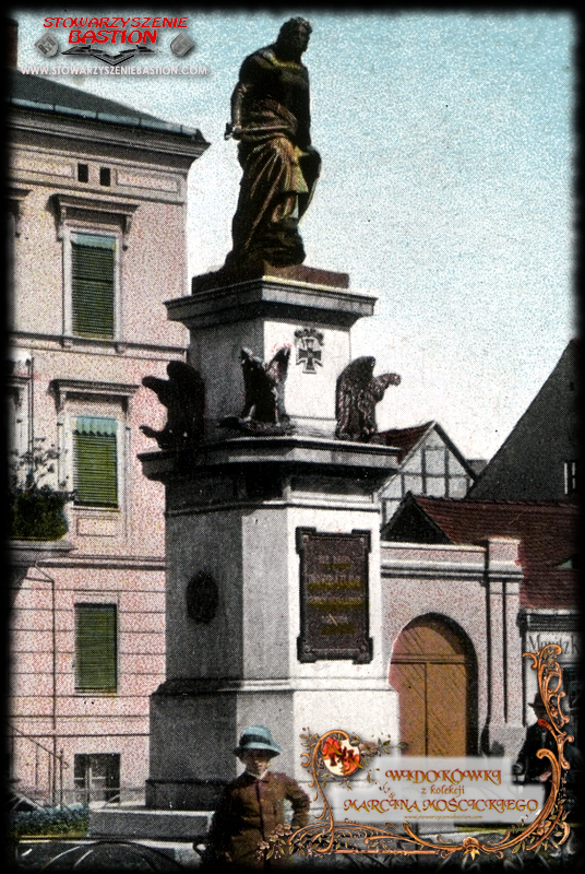 Pomnik ku czci poległych w wojnie francusko-pruskiej 1870/71, pierwotnie zlokalizowany na inowrocławskim Rynku.